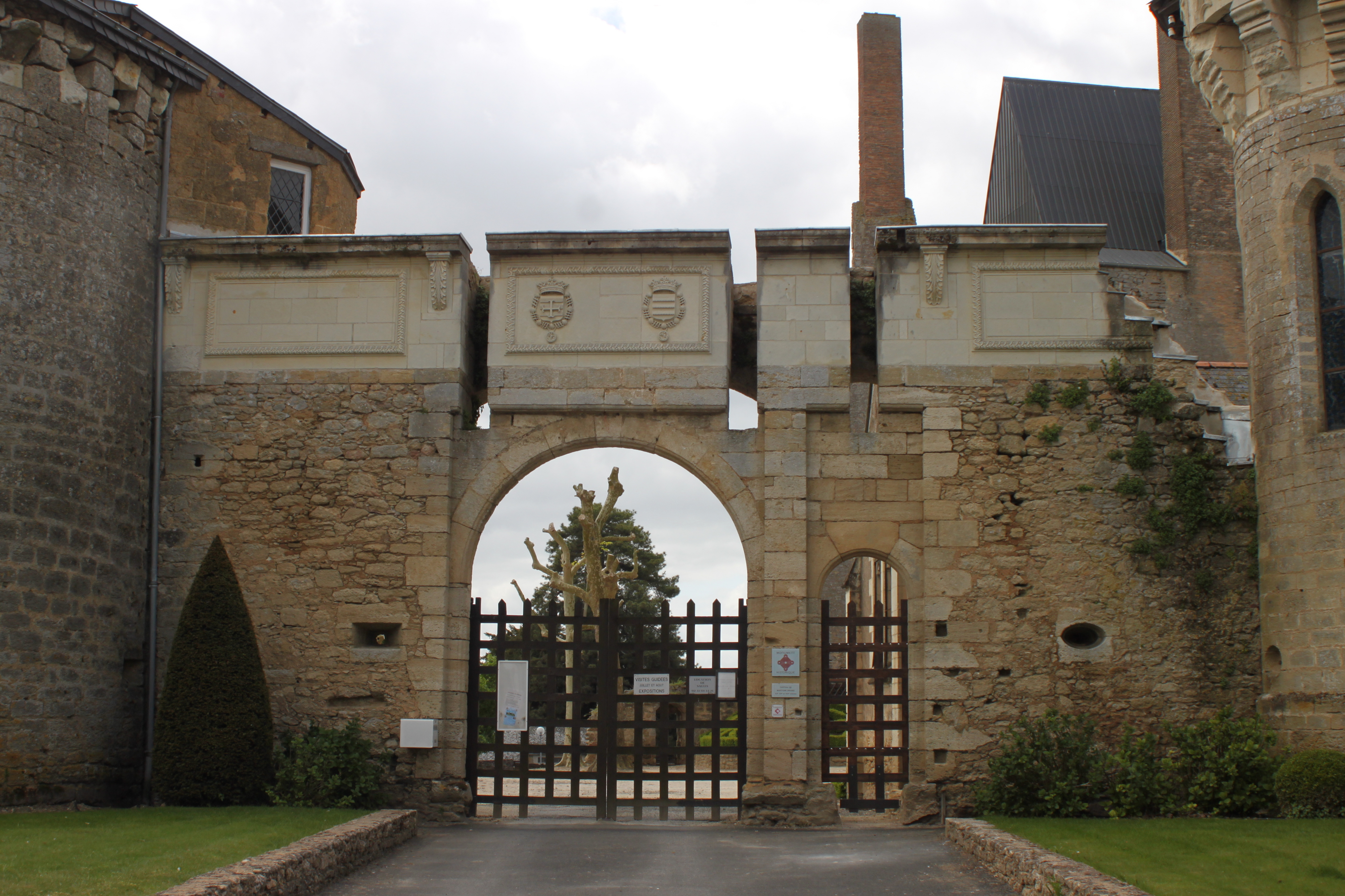 Entrée du château, Fr-49-Martigné-Briand.